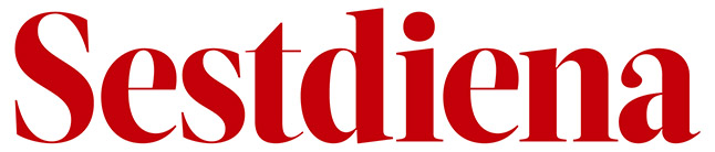 Žurnāls Sestdiena logotips